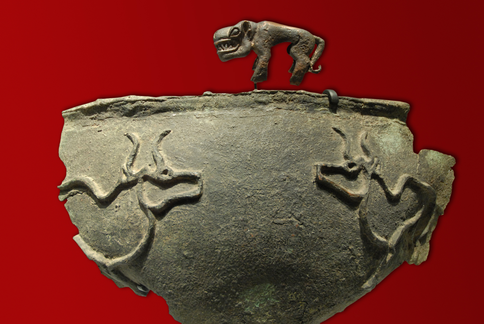 Fragment de la panse d'un vase avec motif d'antilopes saïgas debout région d'Almaty Sud-est du Kazakhstan Ve-IIIè siècle avant notre ère Cuivre sculpté, coulé et soudé Almaty Félin, élément de décor d'un chaudron Almaty Sud-est du Kazakhstan VIIè-IVè siècle avant notre ère Cuivre Almaty Objets présentés dans l'exposition « Kazakhstan Hommes, bêtes et dieux de la steppe » au Musée Guimet, musée national des arts asiatiques jusqu'au 31 janvier 2011